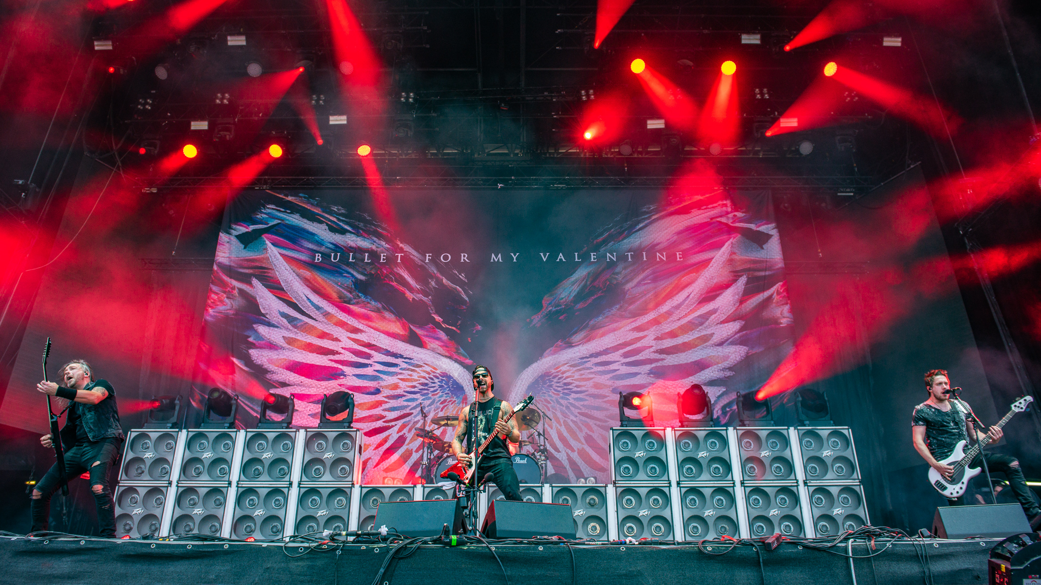 ARGO-Konzerte,Beck's Park Stage,Bullet for My Valentine,Festival,Jamie Mathias,Konzert,Livekonzert,Livemusik,Matthew Tuck,Michael Paget,Musik,RiP,Rock im Park 2018